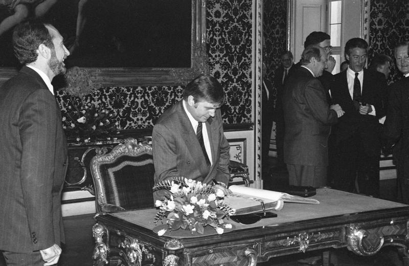 20.-21.12.1990 Konferenz der Regierungschefs der 16 Bundesländer der Bundesrepublik Deutschland in München 20.12. Empfang durch den bayerischen Ministerpräsidenten, Max Streibl, im Prinz-Carl-Palais Eintragung in das Gästebuch der bayerischen Staatsregierung